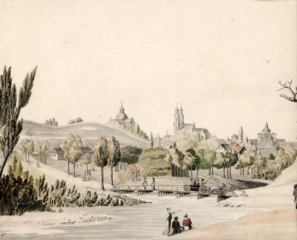 Беларуская (тарашкевіца): Вільня (Vilnia), рака Вільня (Vilnia), Зарэчча (Zarečča) і Паплавы (Papłavy)